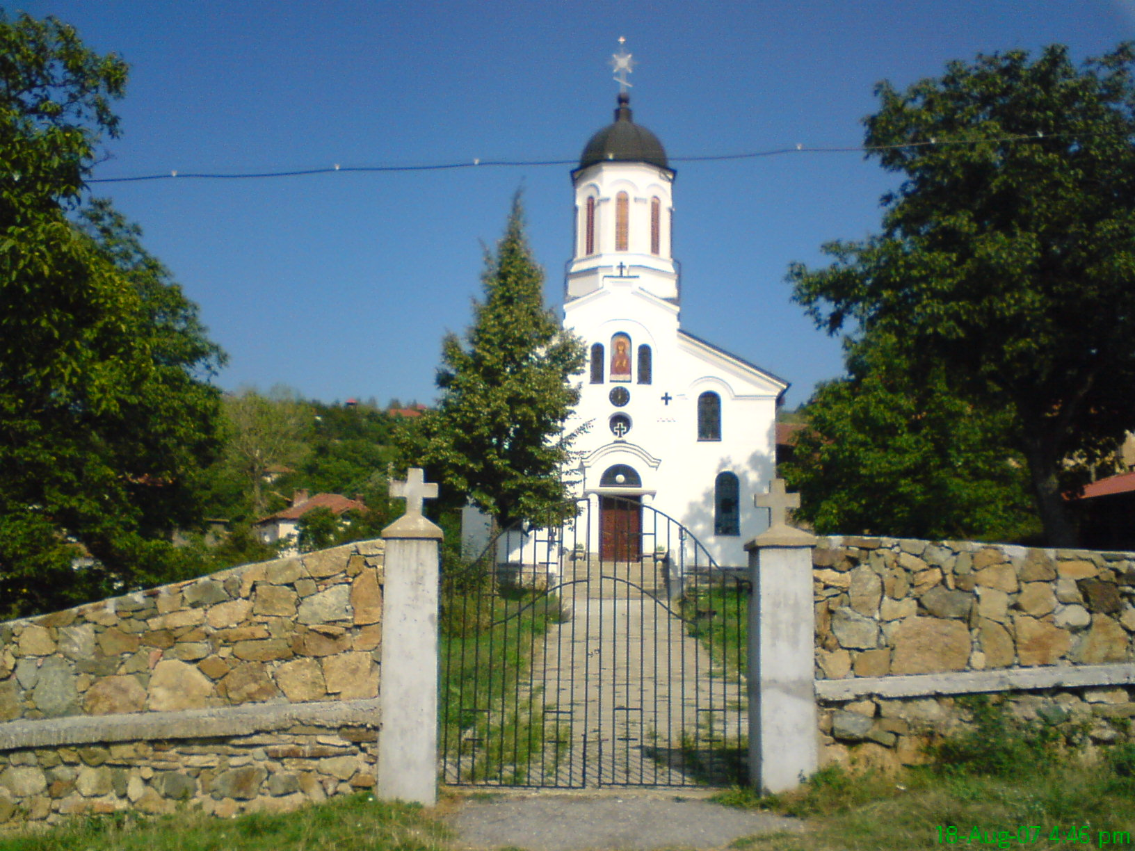 Църквата "Света Петка" в село Дрен